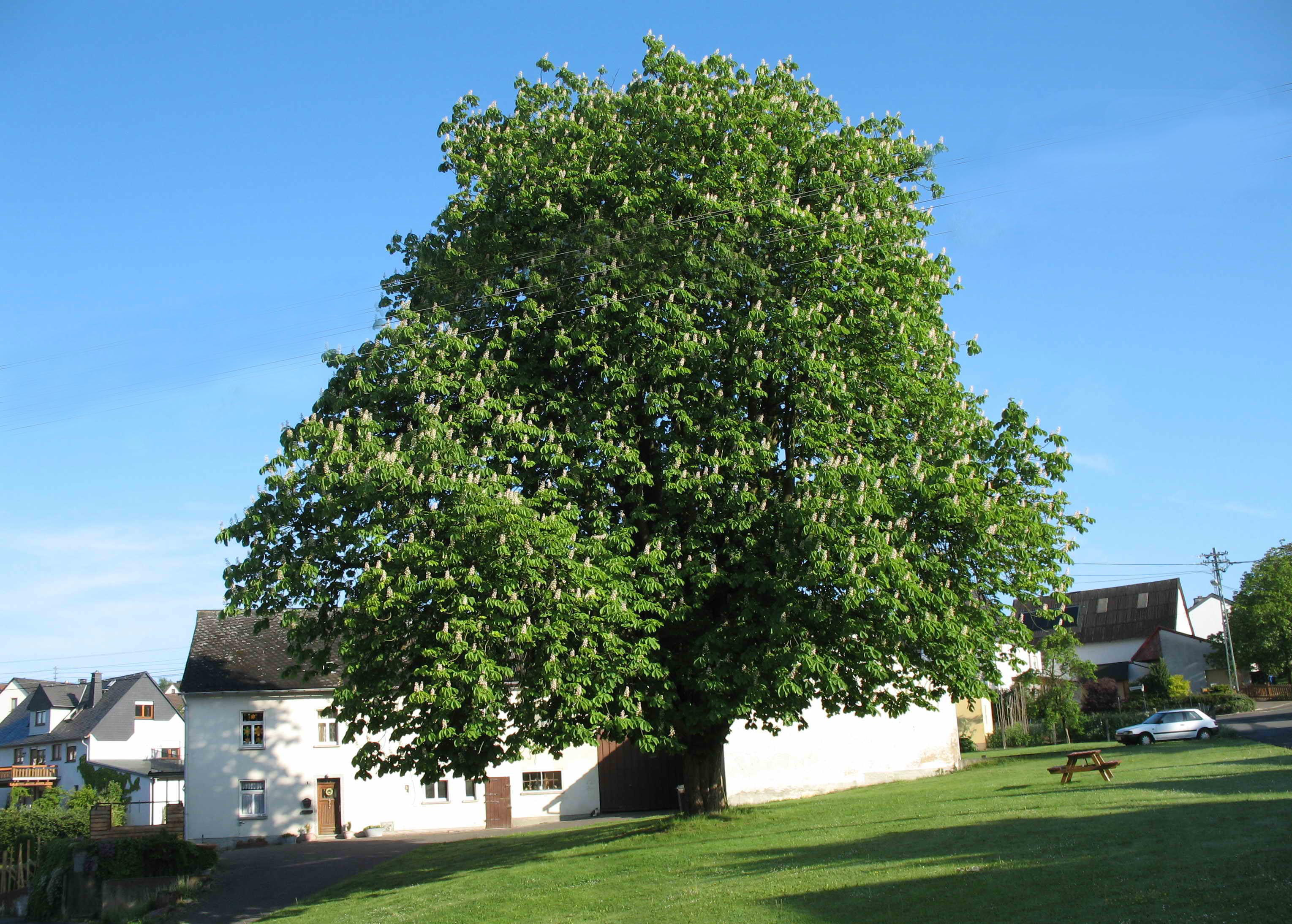 Rosskastanie im Frühling